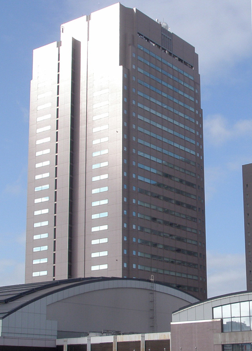 千葉ポートスクエア